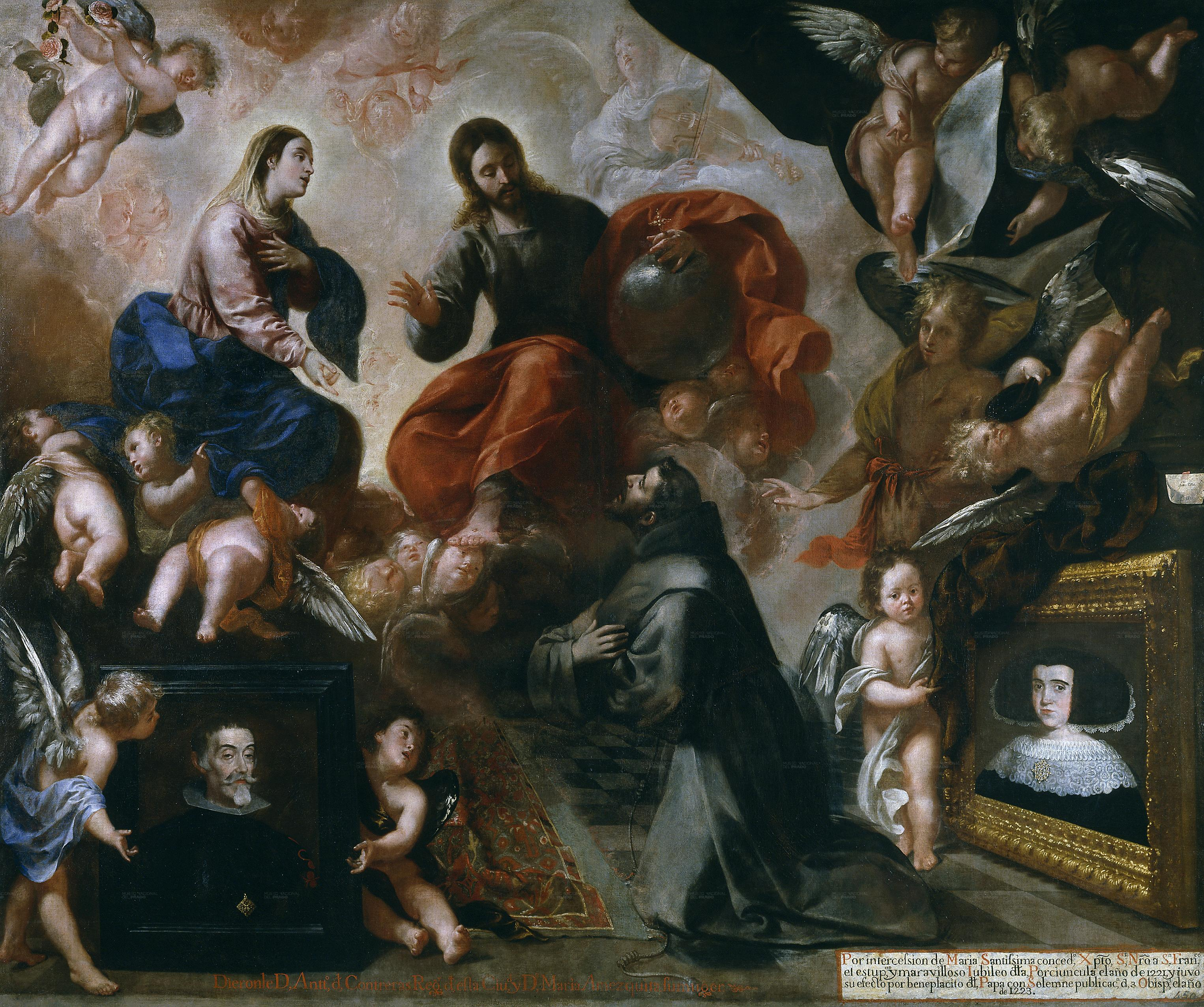 La obra representa a San Francisco de Asís, el fundador de la Orden de los franciscanos, junto a los donantes de la obra.